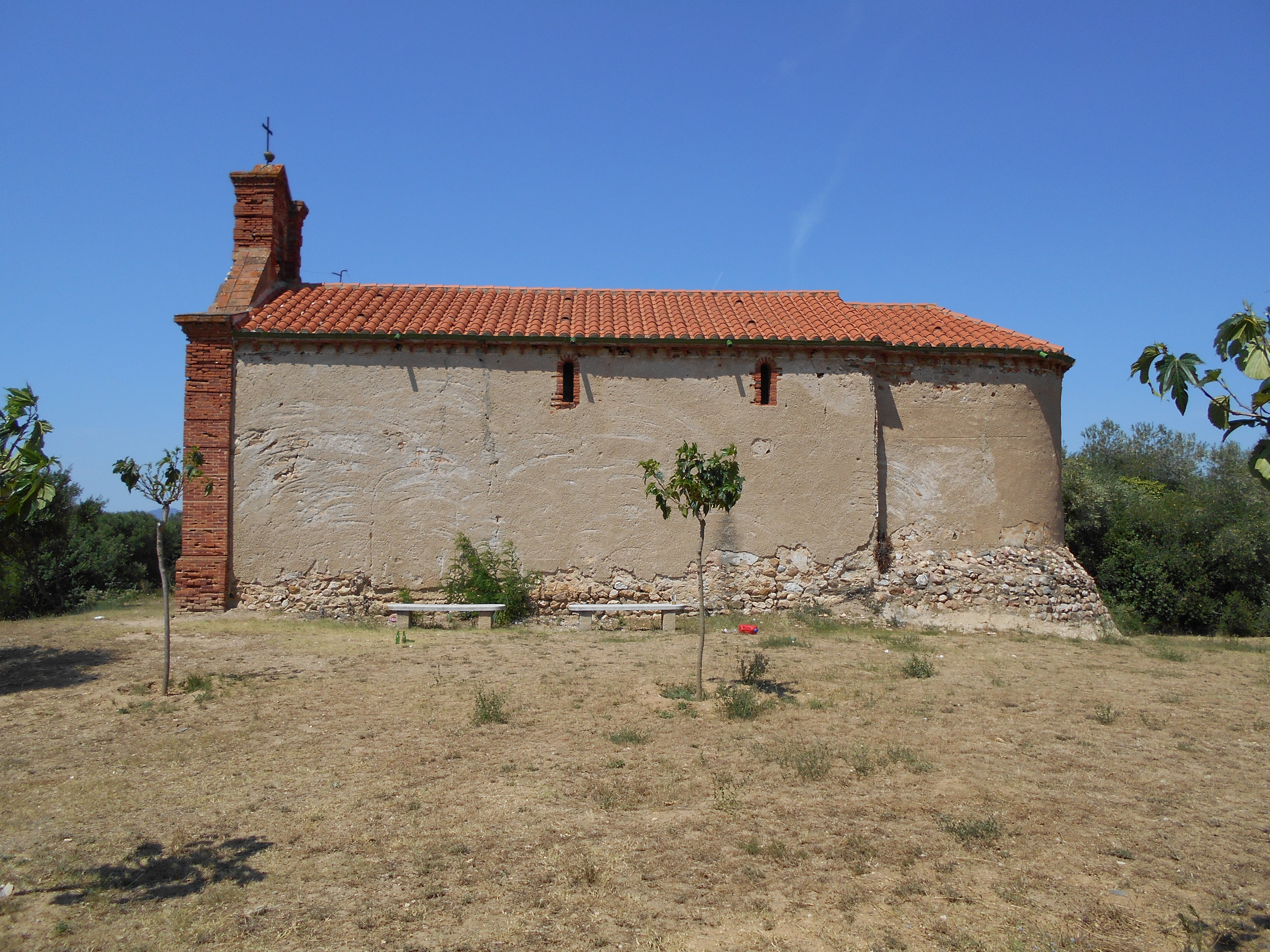 Façana meridional de l'església